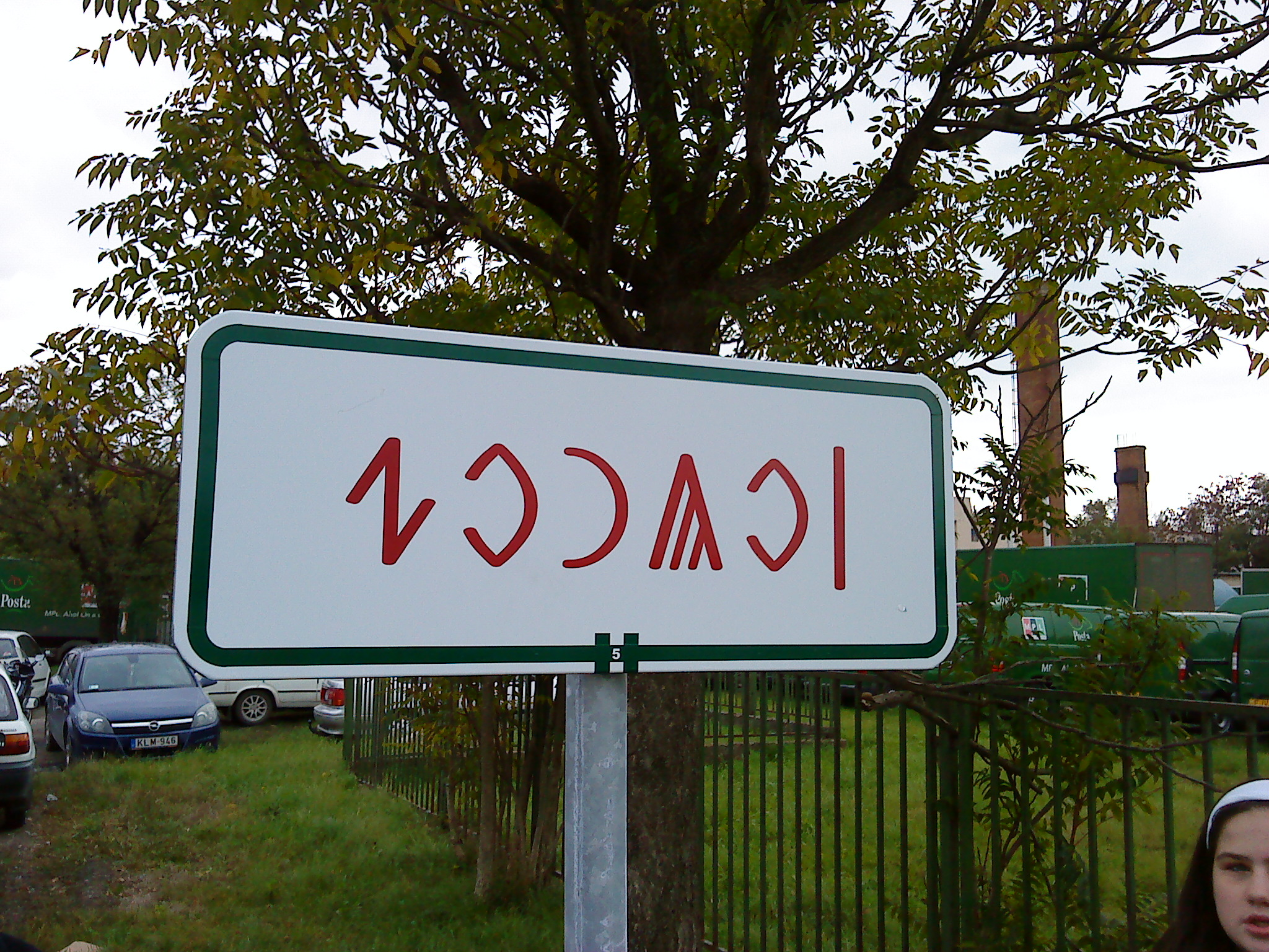 Rovásos helységnévtábla Szolnokon